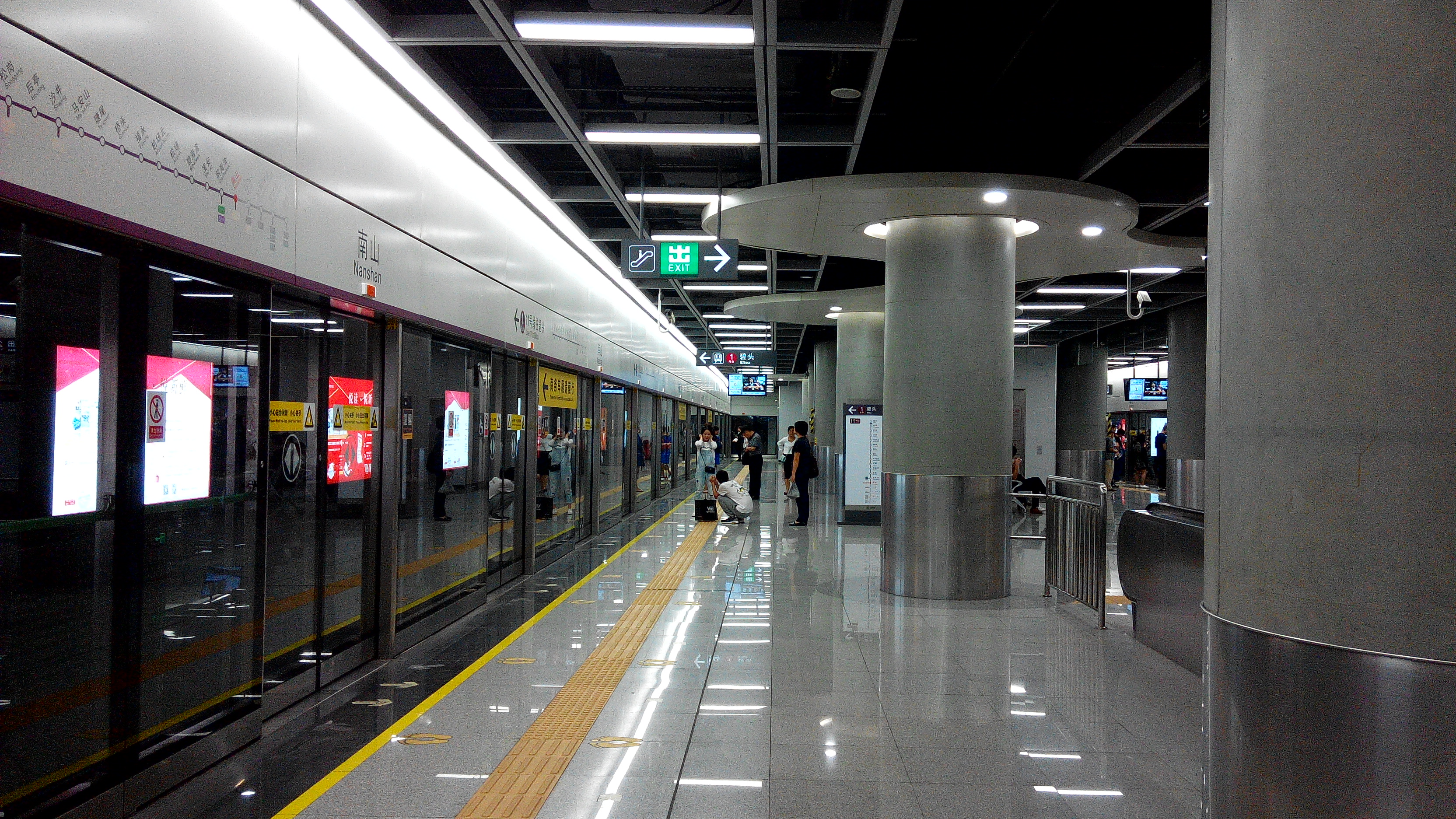 深圳地铁11号线 南山站1号站台